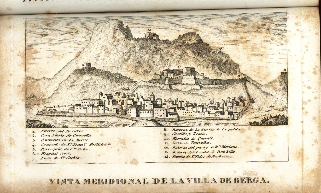 Berga. Eduardo Chao. "La guerra de Cataluña". Madrid 1847